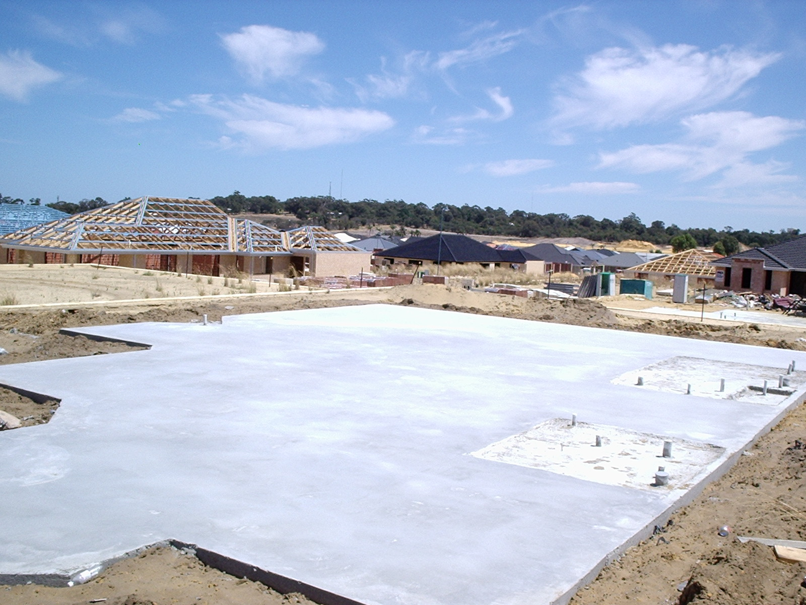 Slab on grade construction